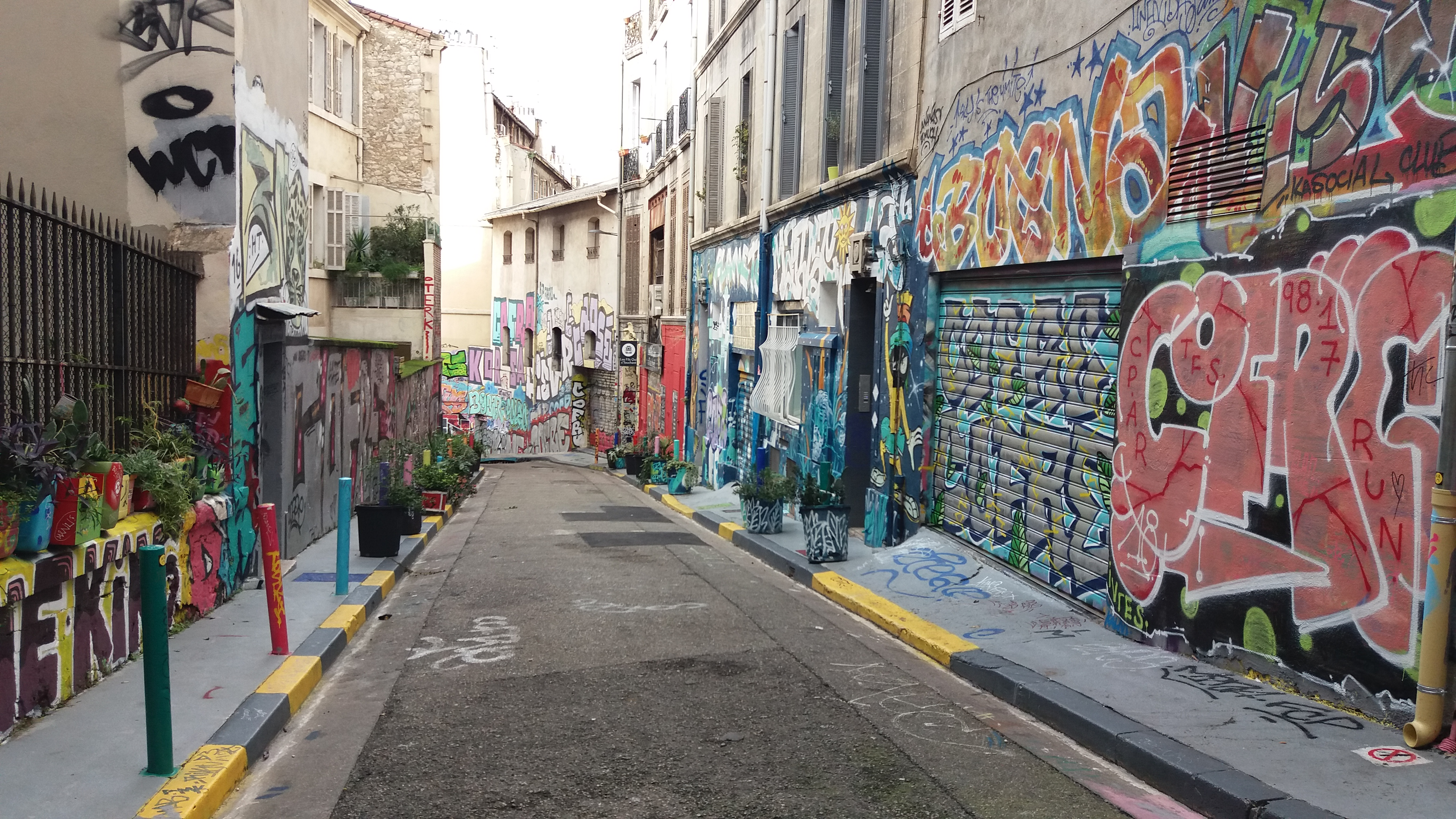 Rue Armand Bédarride, Marseille (Bouches-du-Rhône, France)